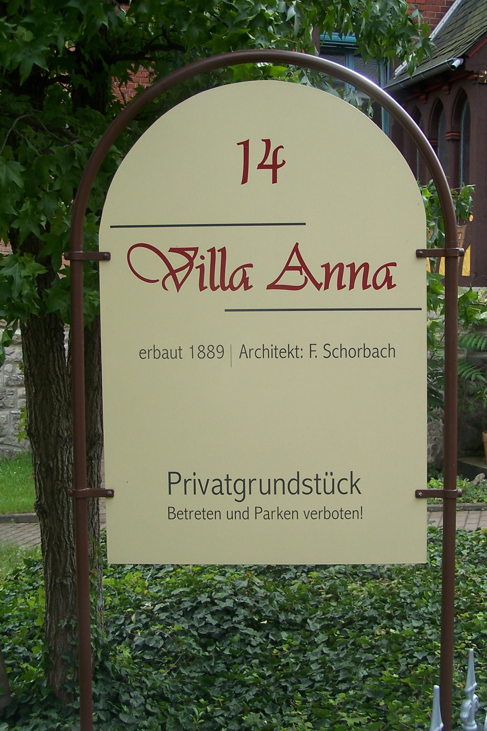 Schild Villa Anna.